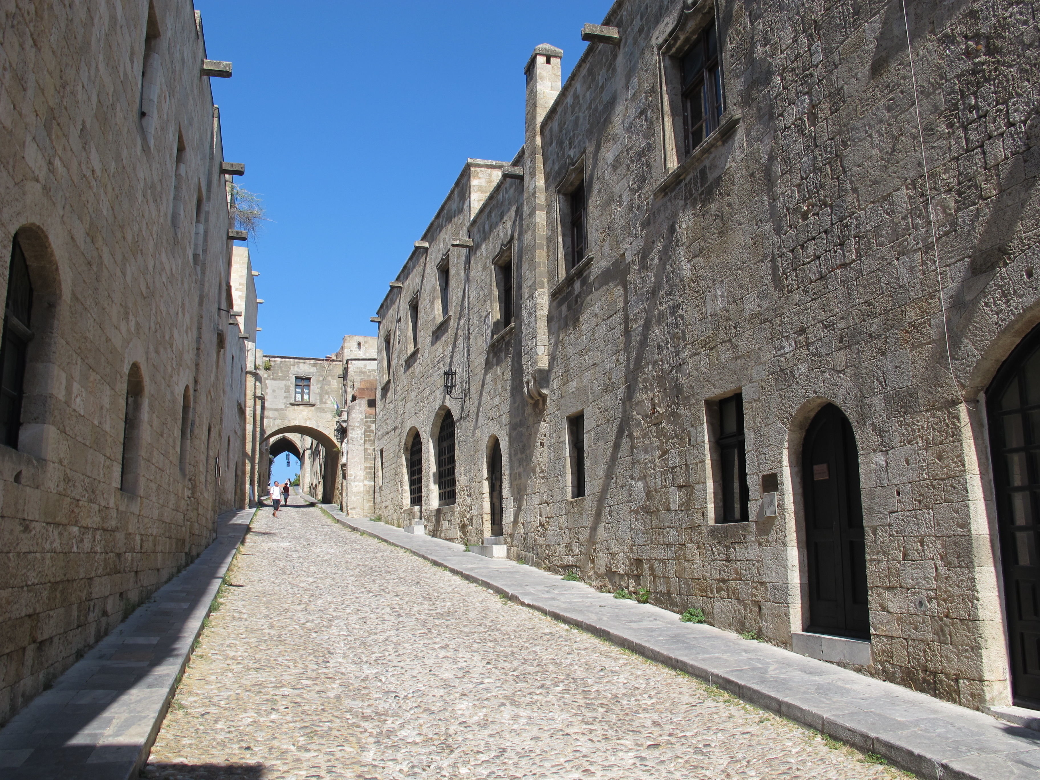 Odos Ippoton